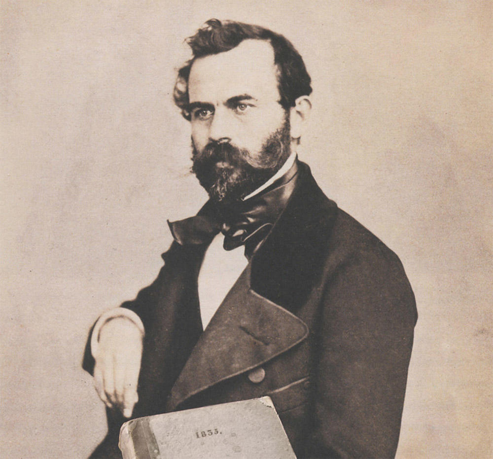 Autoportrait d'Édouard Baldus (vers 1853).